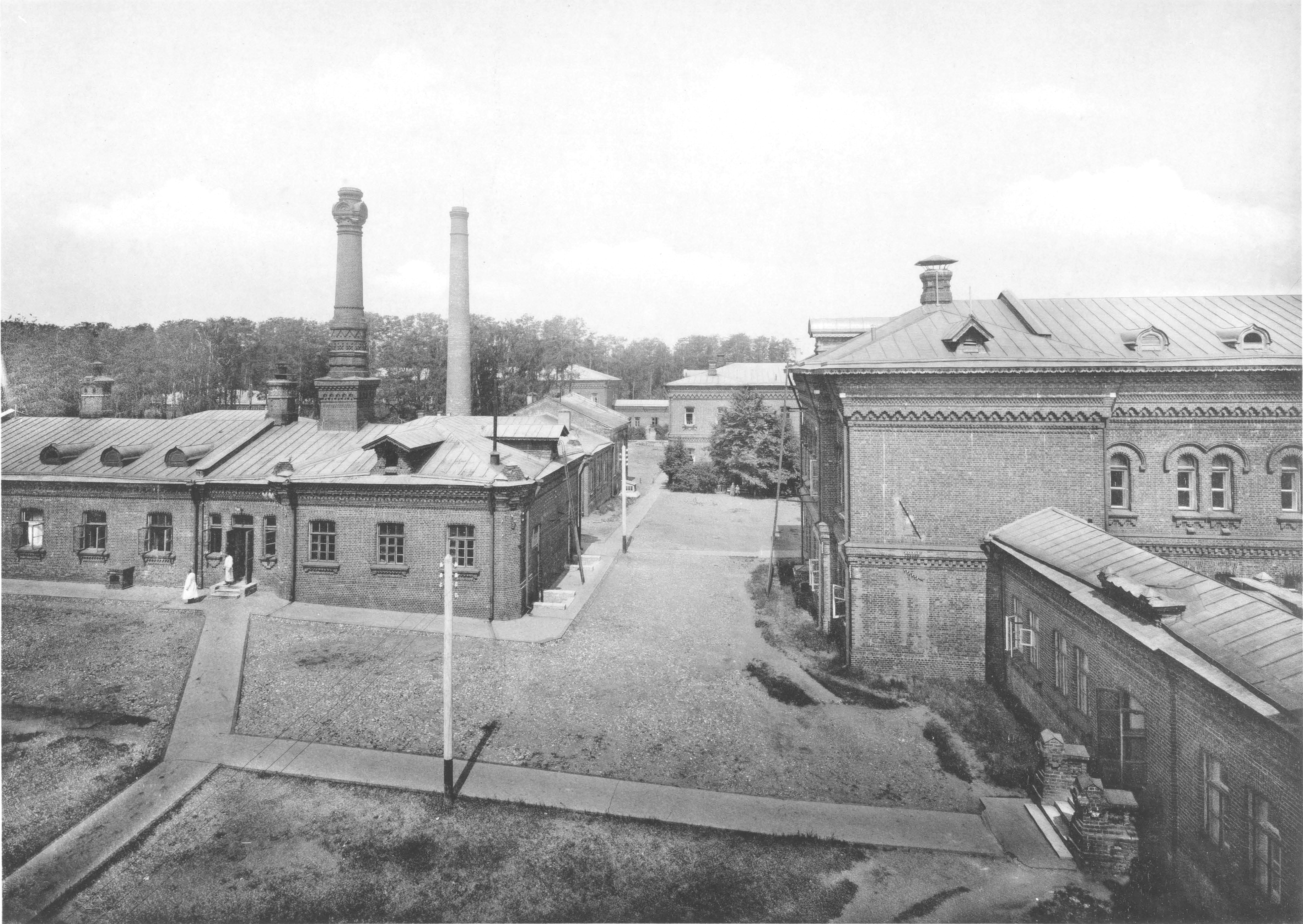 87. Психiатрическая больница им. Н. А. АлексЪева на Канатчиковой дачЪ. Видъ со двора. (Москва)